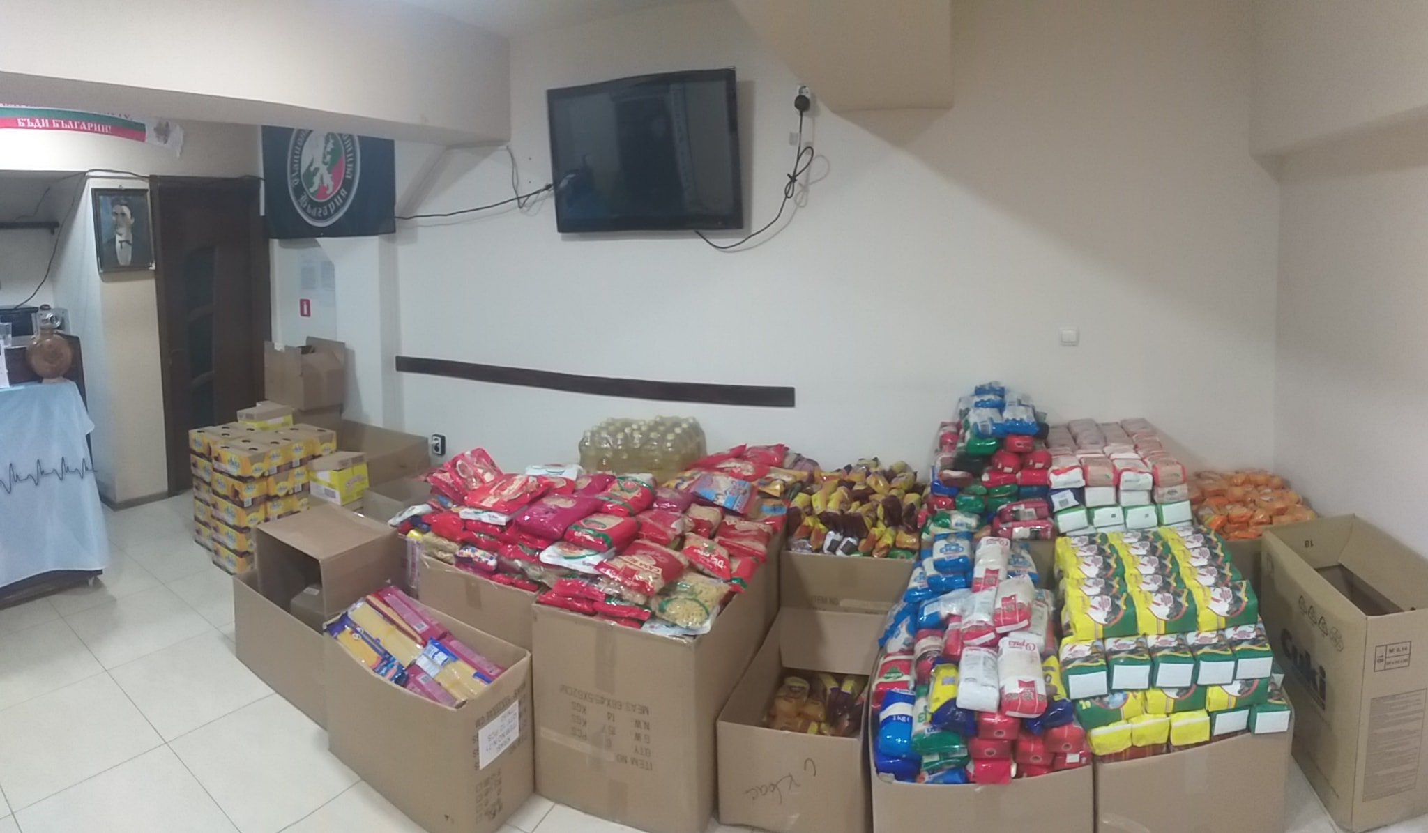 От хората за хората - Национална Съпротива